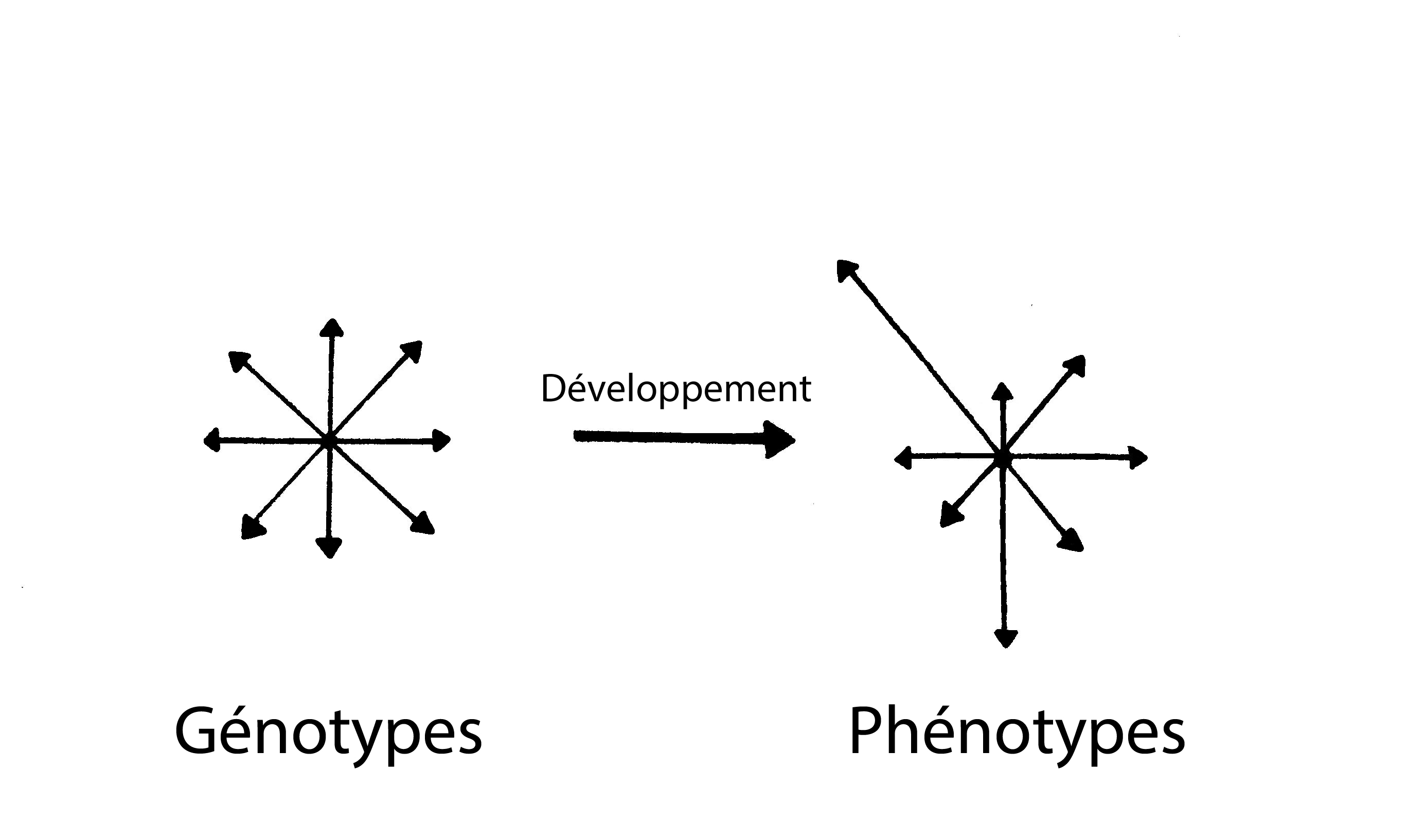 Distribution non uniforme des phénotypes à partir d'une distribution uniforme de génotypes, sous l'effet d'un biais de développement